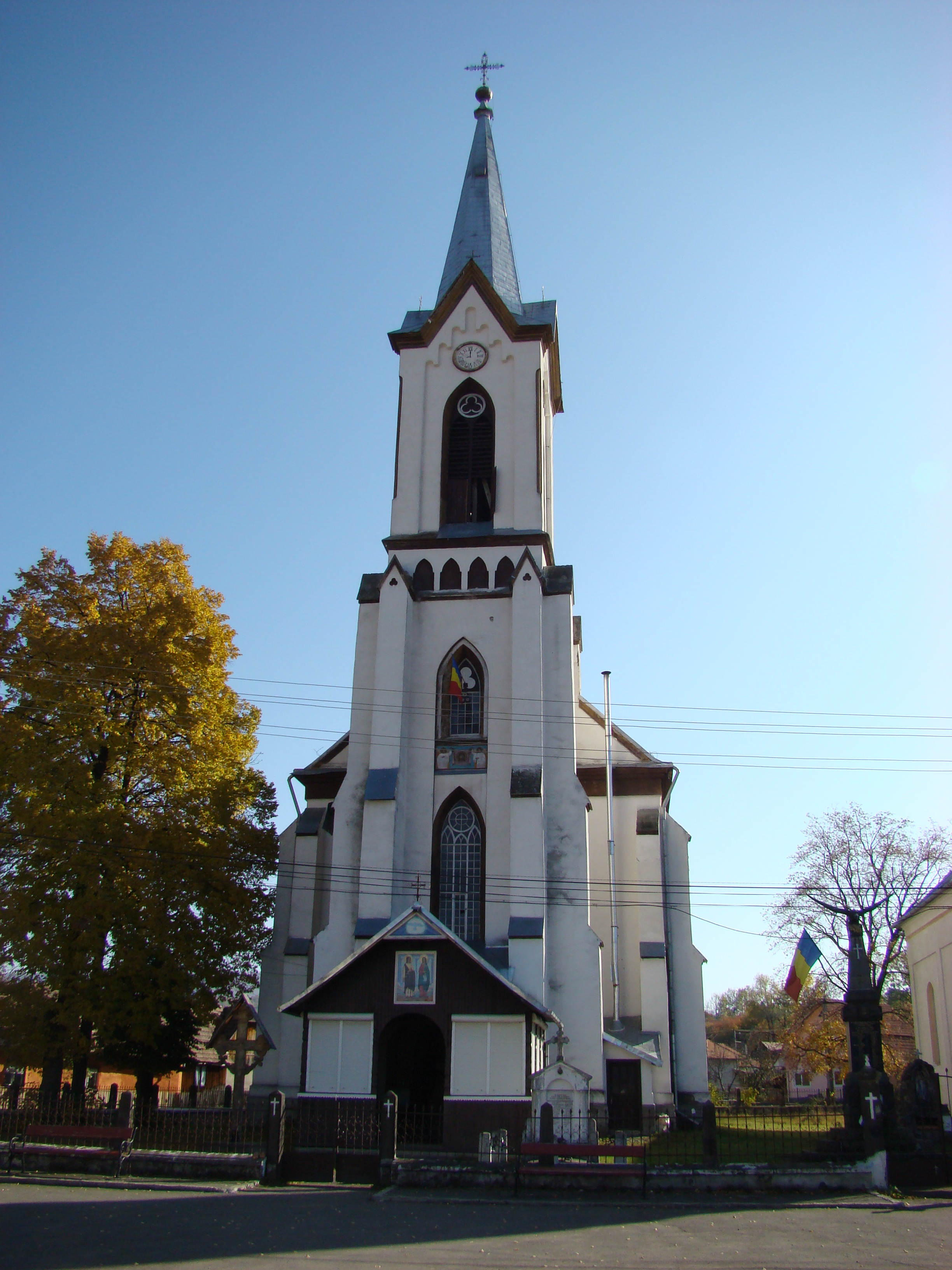 Biserica ortodoxă din Ibănești, județul Mureș